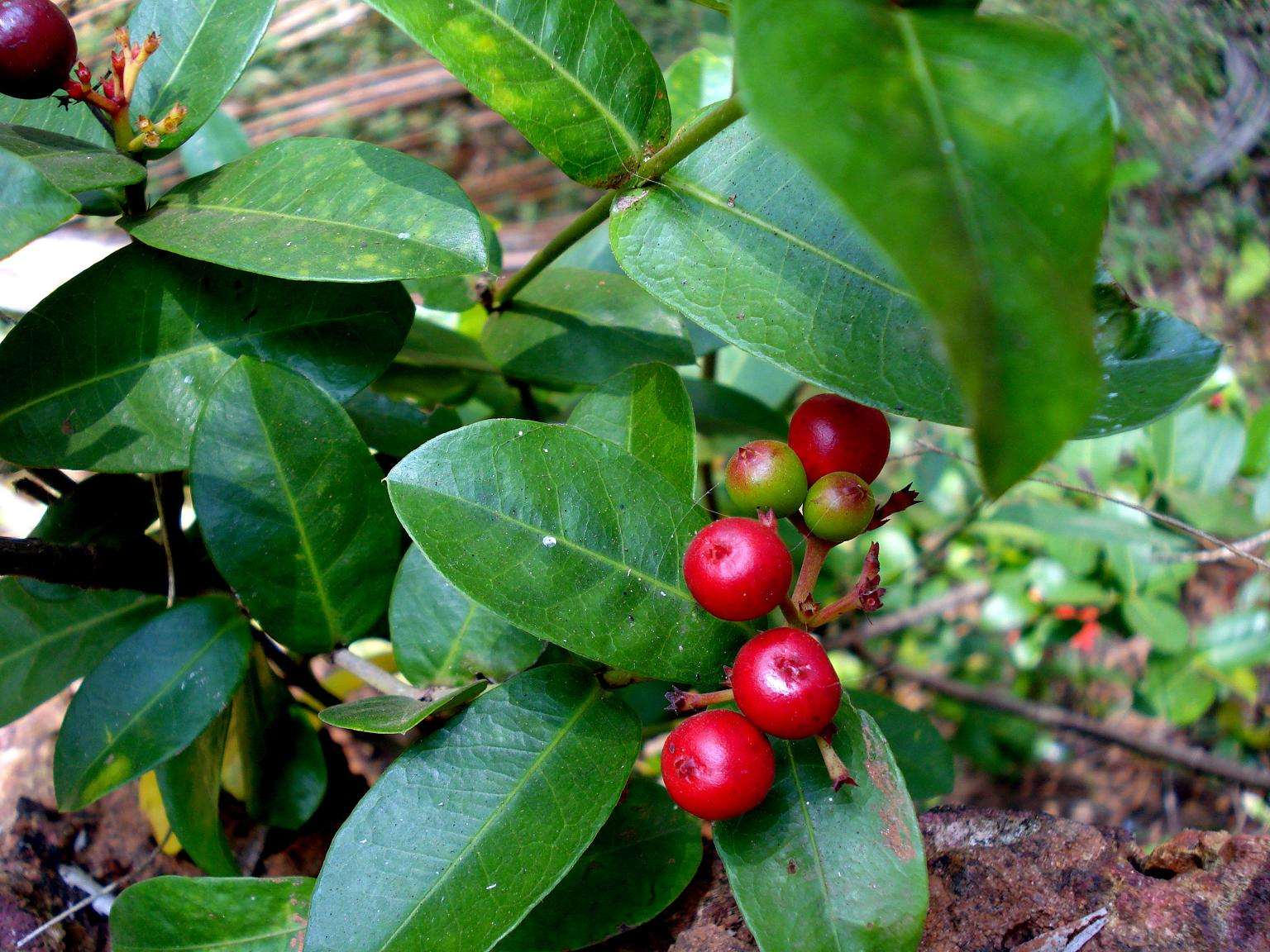 Name : Ixora coccinea Family : Rubiaceae തെറ്റിയുടെ കായ കായയുടെ ഉള്ളിൽ 2 വിത്തുകൾ ഉണ്ടാവും പല നിറങ്ങളിൽ കാണുന്ന തെറ്റി പൂന്തോട്ടങ്ങളെ അലങ്കരിക്കുന്നുണ്ട്. ക്ഷേത്രങ്ങളിൽ ആരാധനക്ക് മാലകെട്ടാൻ തെറ്റിപൂവ് ഉപയോഗിക്കുന്നു. തെറ്റിയുടെ പൂവ് വേര് എന്നിവ ഔഷധമായും ഉപയോഗിക്കുന്നുണ്ട്.